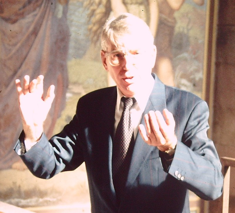 Siegfried Koesler am 9. Oktober 1994 bei einer Probe mit dem Würzburger Domchor im Speyerer Dom